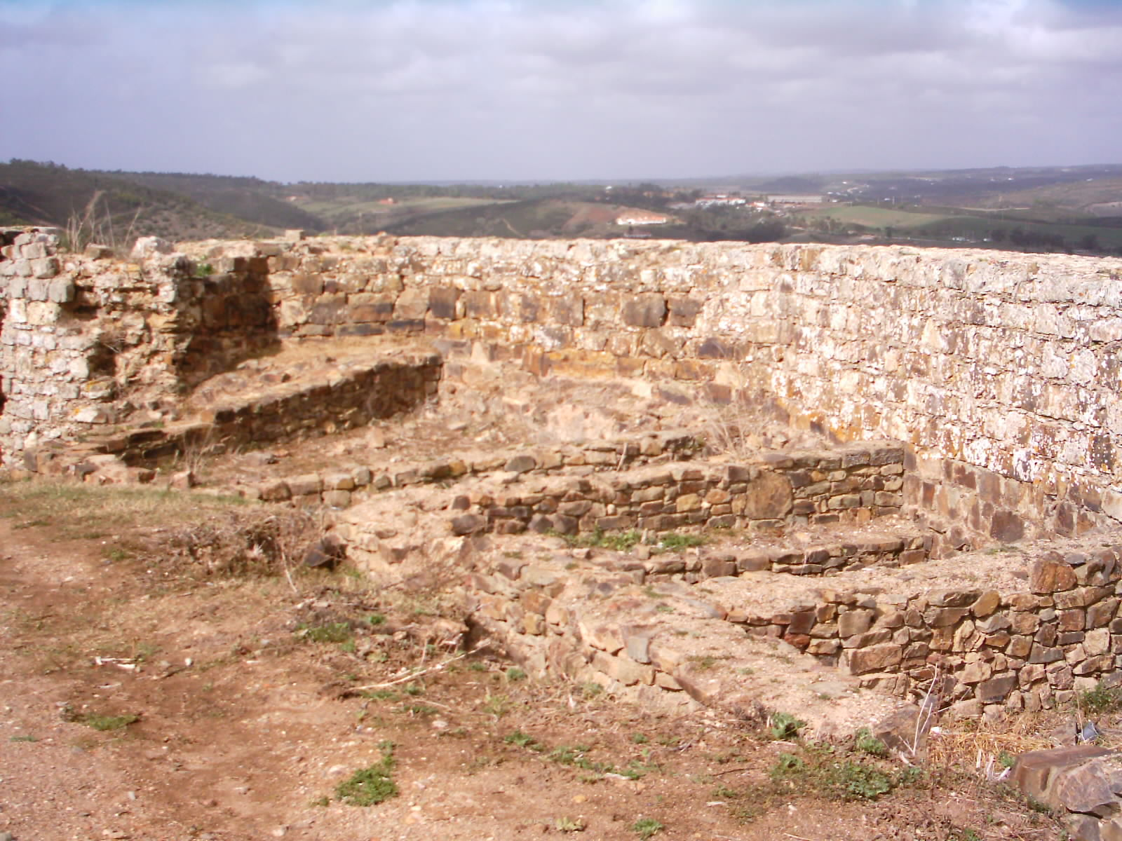 Castelo de Aljezur, Aljezur, Portugal.